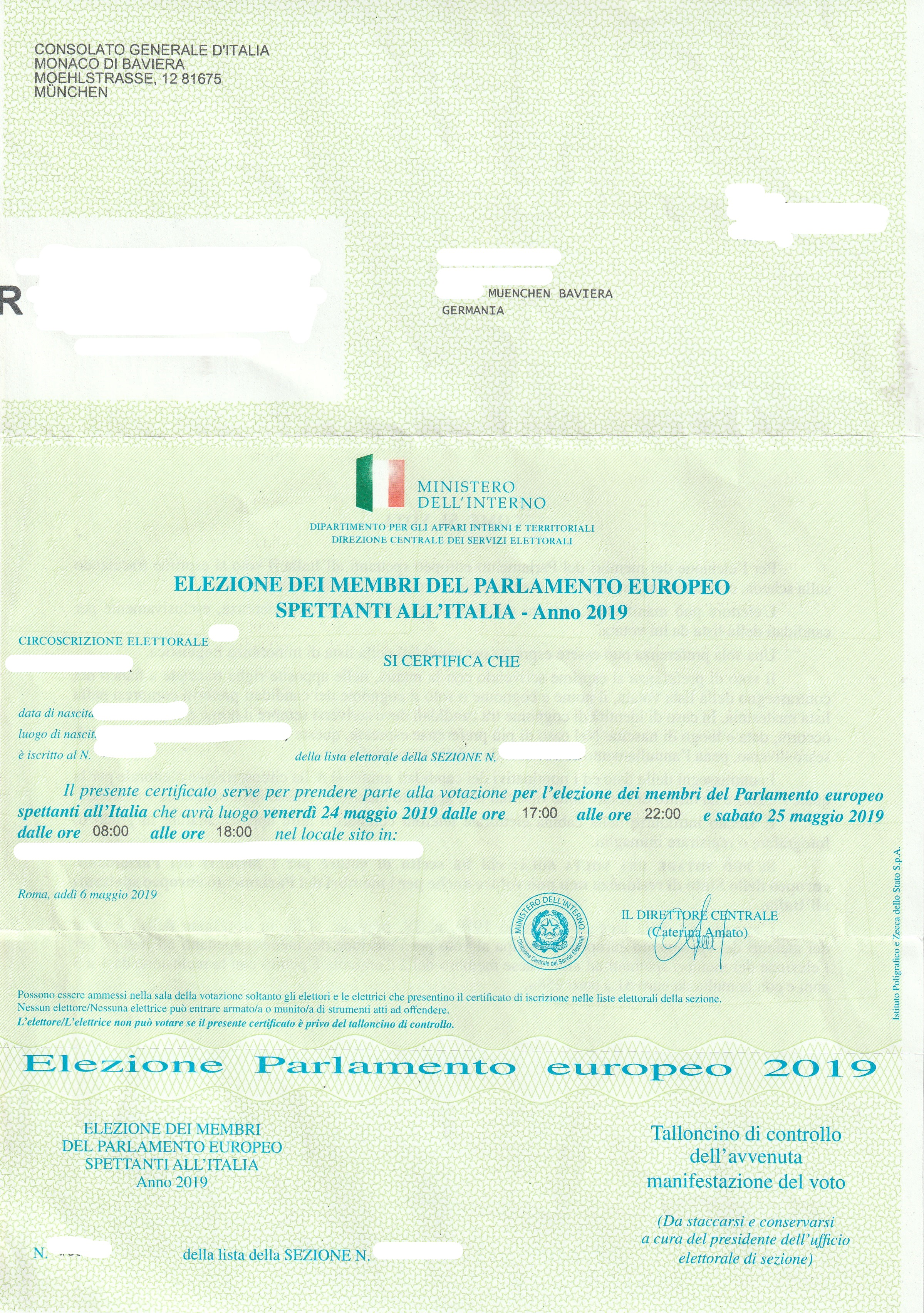 Certificato elettorale per l'estero inviato dal Ministero dell'Interno per le votazioni europee 2019 spettanti all'Italia.